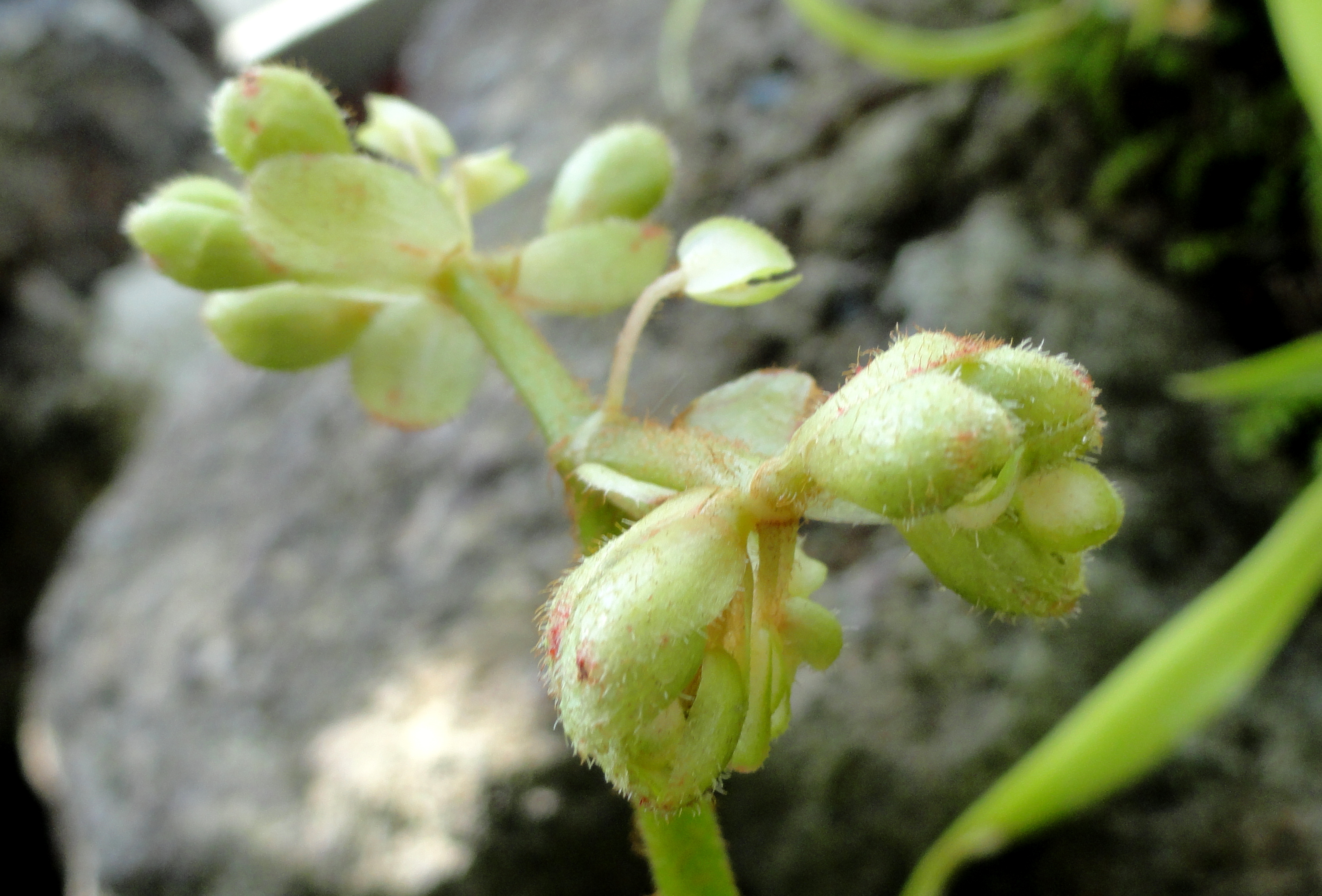 Begonia nepalensis specimen in the Botanischer Garten München-Nymphenburg, Munich, Germany.